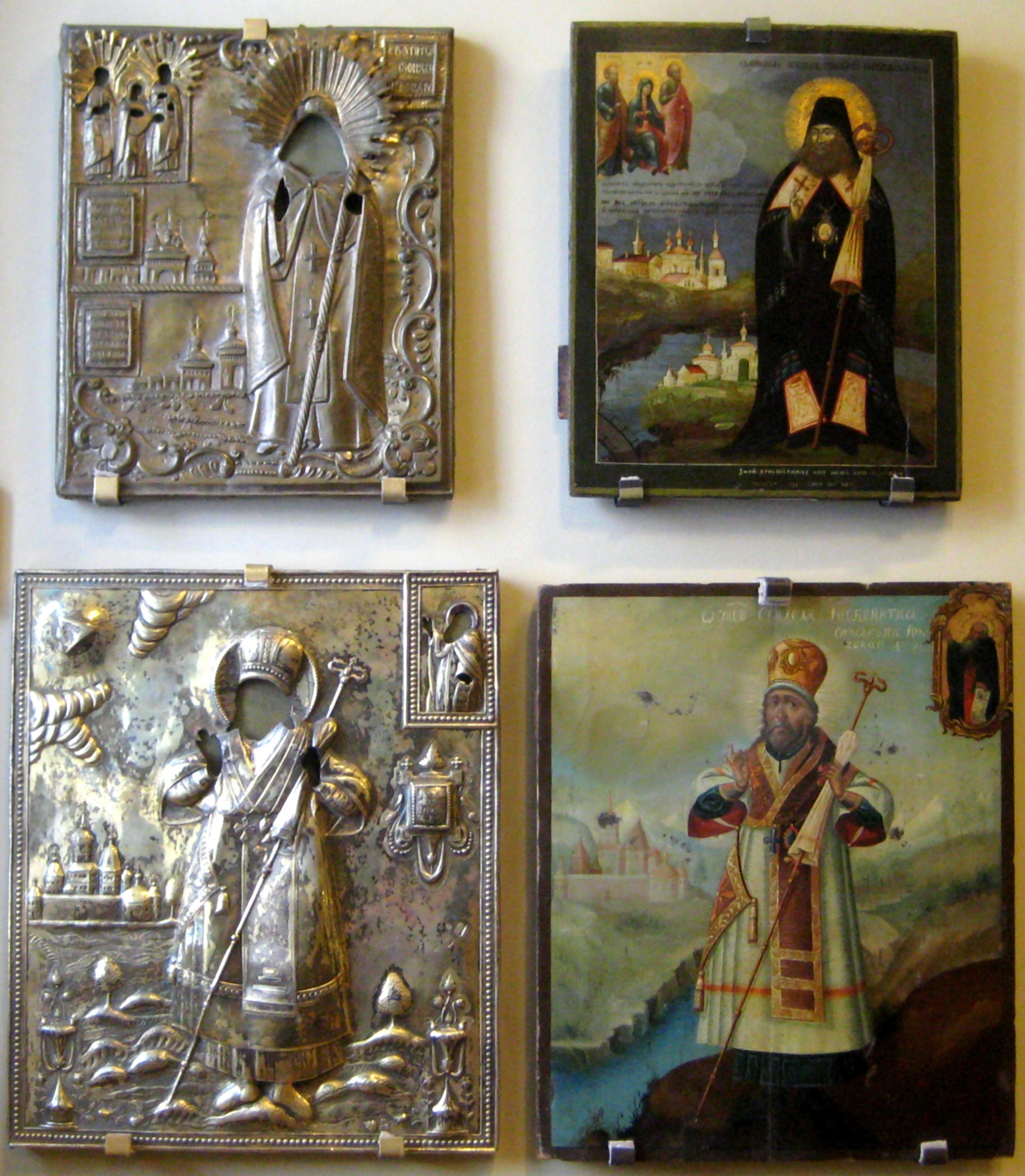 Святитель Тихон Воронежский (начало 19 века). Святитель Иннокентий, епископ Иркутский (Иркутск, начало 19 века. Оклад 1808 года)